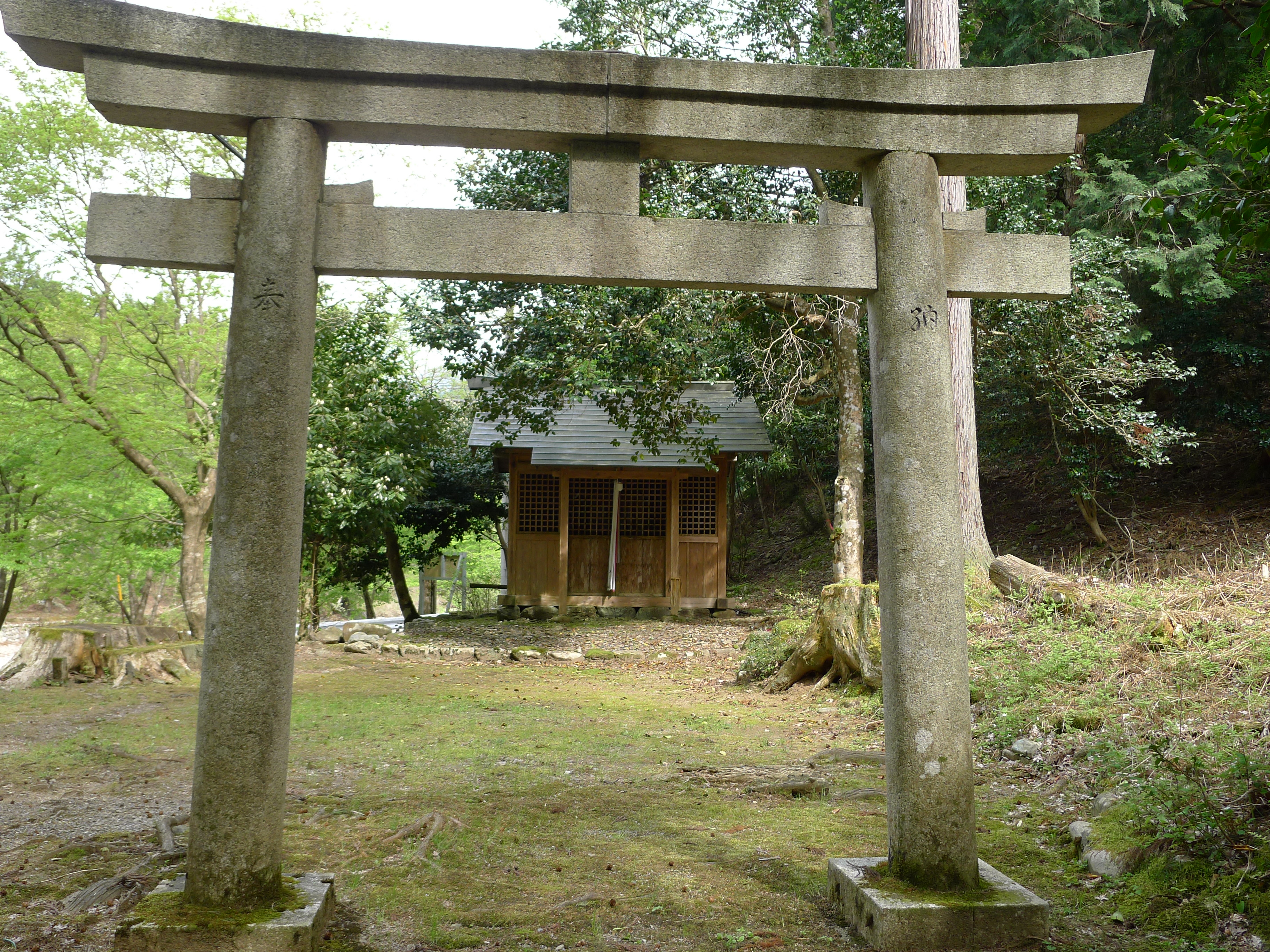 京都市左京区久多（川合町）：山の神神社